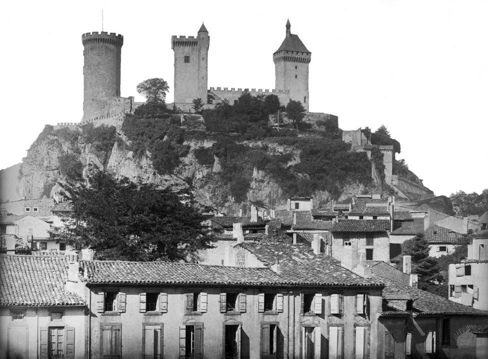 Imatge